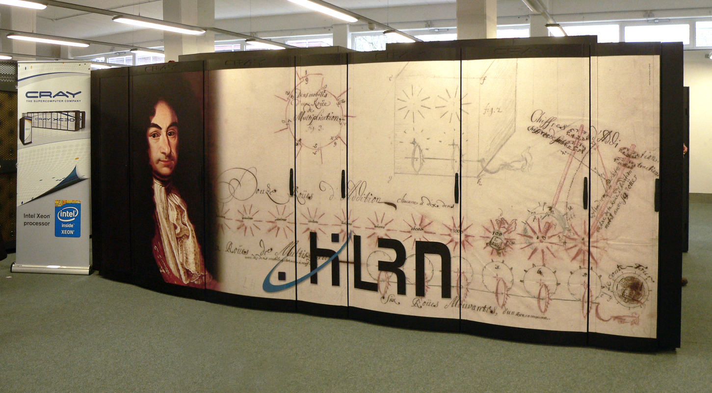 Inbetriebnahme des Supercomputers HLRN-III, genannt Gottfried, am Standort Hannover in der Leibniz Universität Hannover bei einer Pressekonferenz